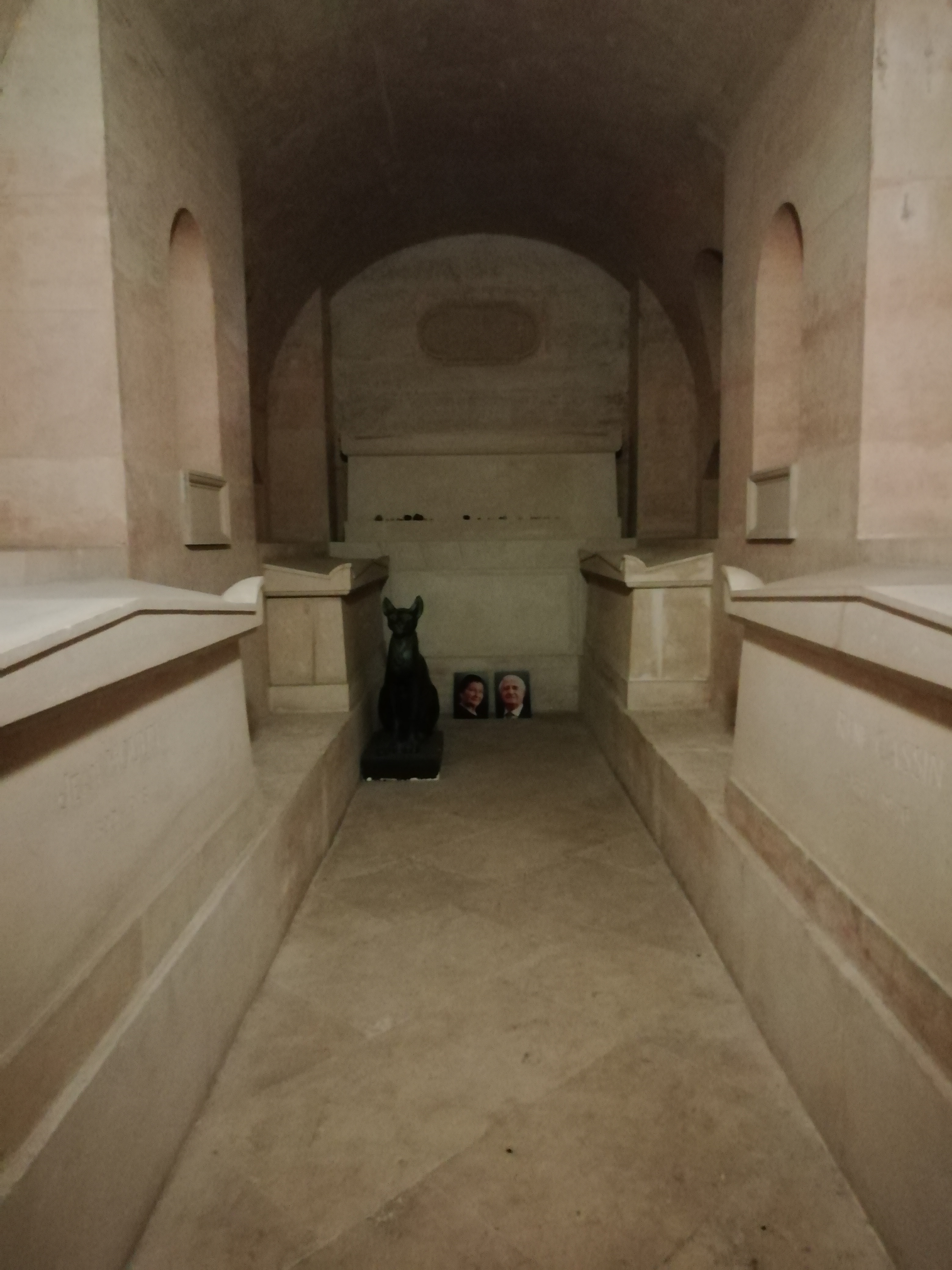 De gauche à droite, tombes de Jean Moulin, André Malraux (à gauche), Simone et Antoine Veil (au milieu), René Cassin et Jean Monnet (à droite) au Panthéon.